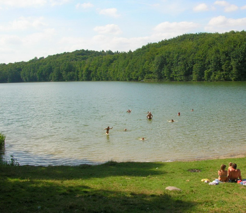 Jezioro Salno k. Byszewa